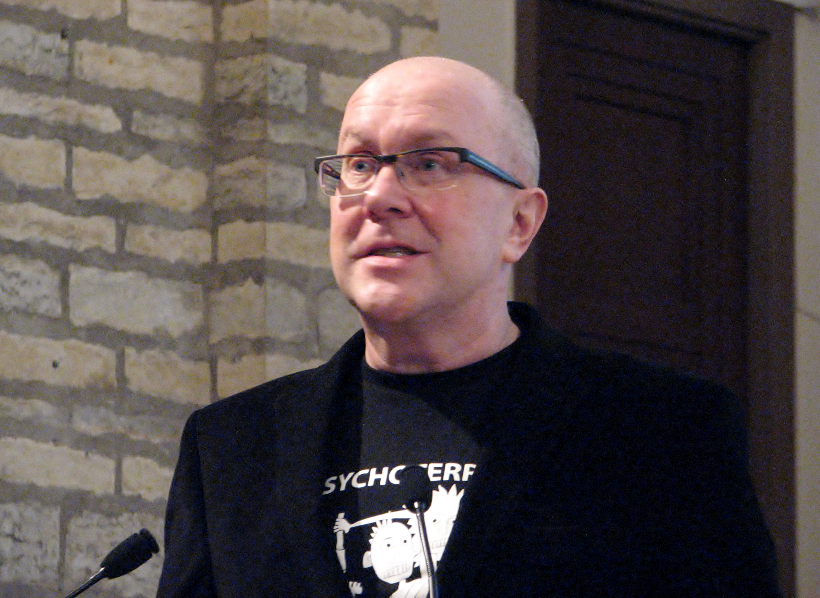 Mart Juurele andis Eesti Raamatukoguhoidjate Ühing Ajakirjandusauhinna 2013